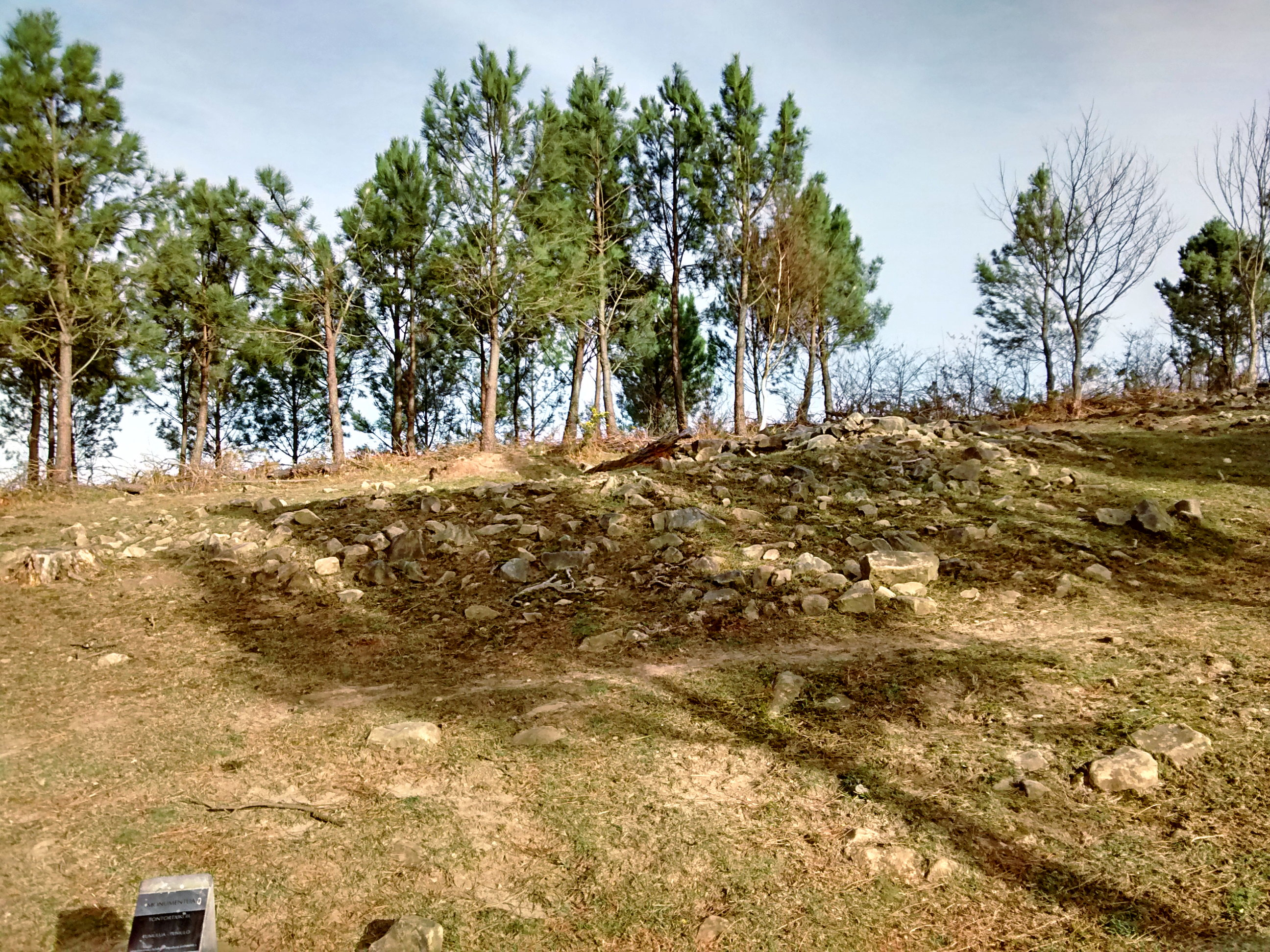 Tontortxiki III tumulua